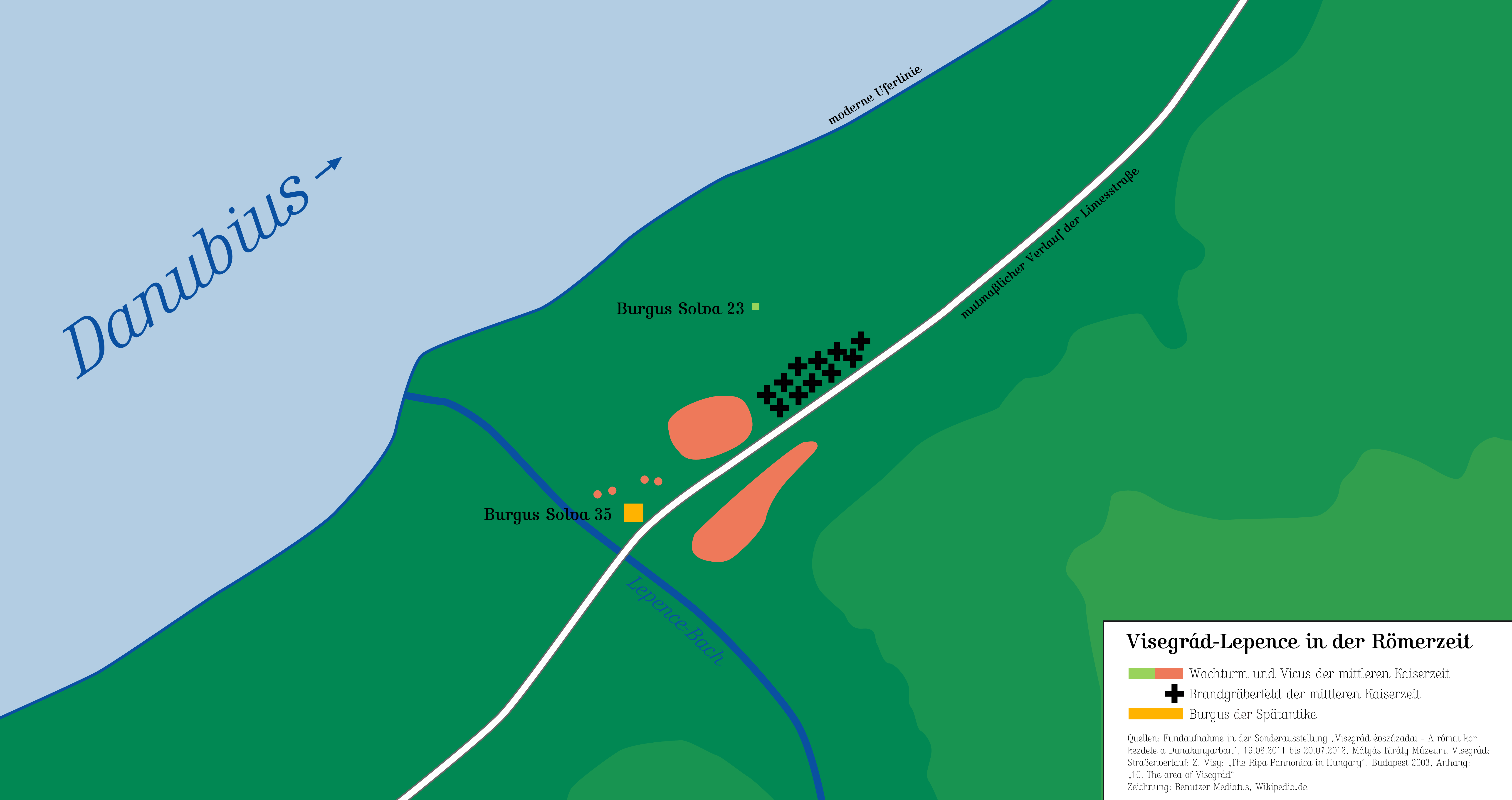 Visegrád-Lepence in der Römerzeit. Die Quellenangabe erfolgt direkt im Bild.